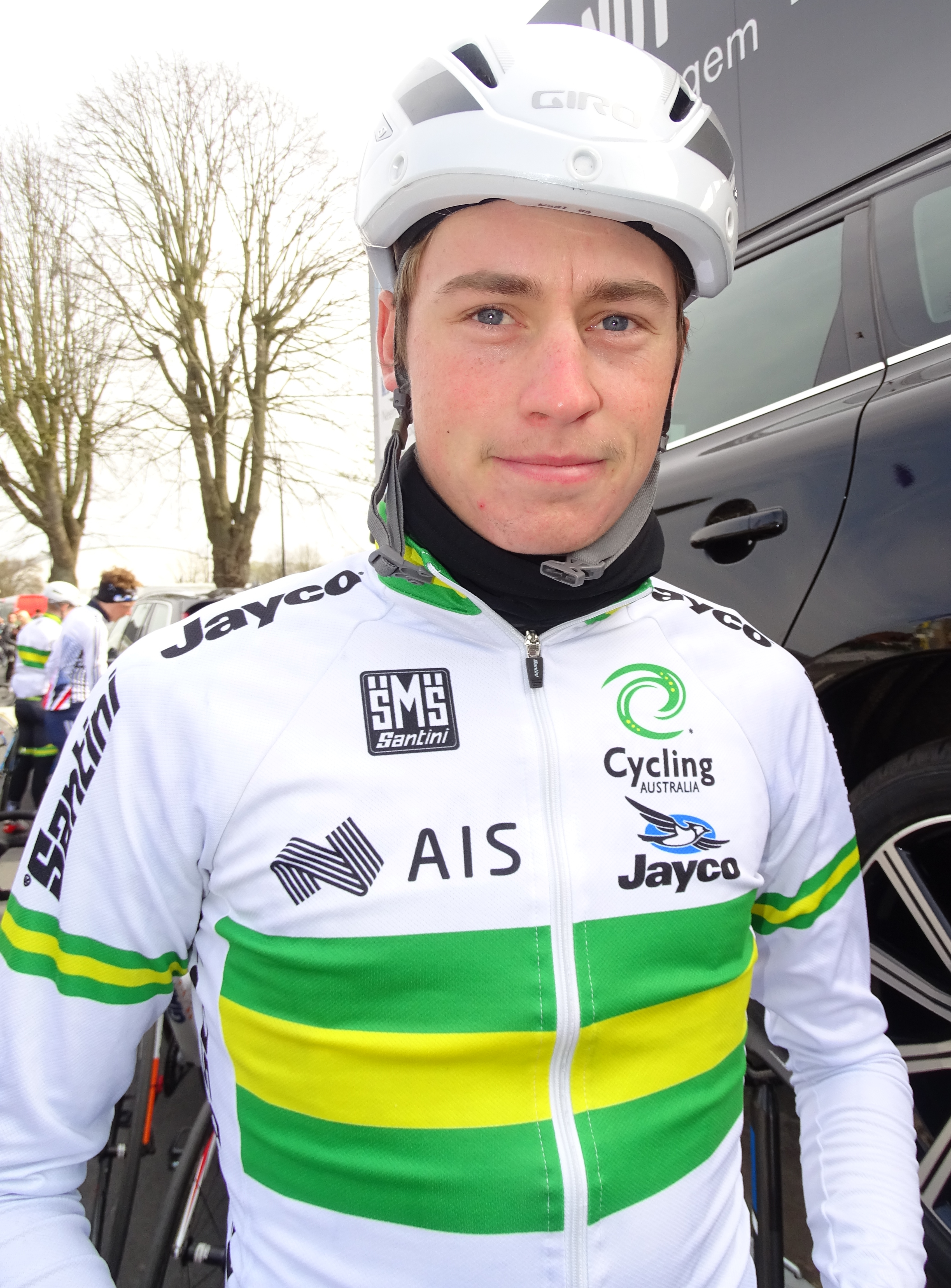 Reportage réalisé le samedi 9 avril à l'occasion du départ et de l'arrivée du Tour des Flandres espoirs 2016 à Audenarde, Belgique.